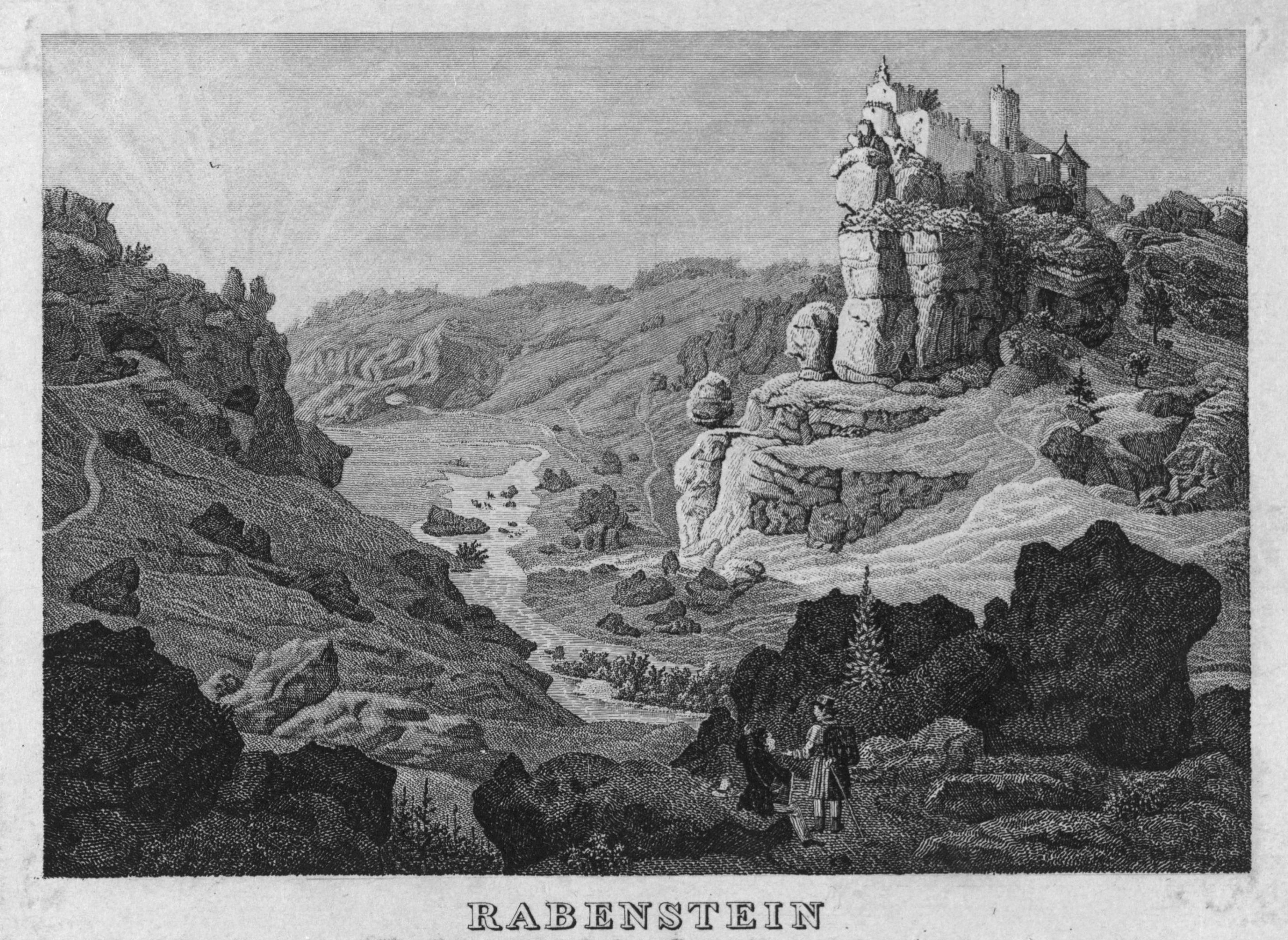 Rabenstein in Erinnerungsblatt für Freunde Muggendorfs und dessen Umgebungen. Nach der Natur gezeichnet und gestochen von C. Wießner in Nürnberg. 1834